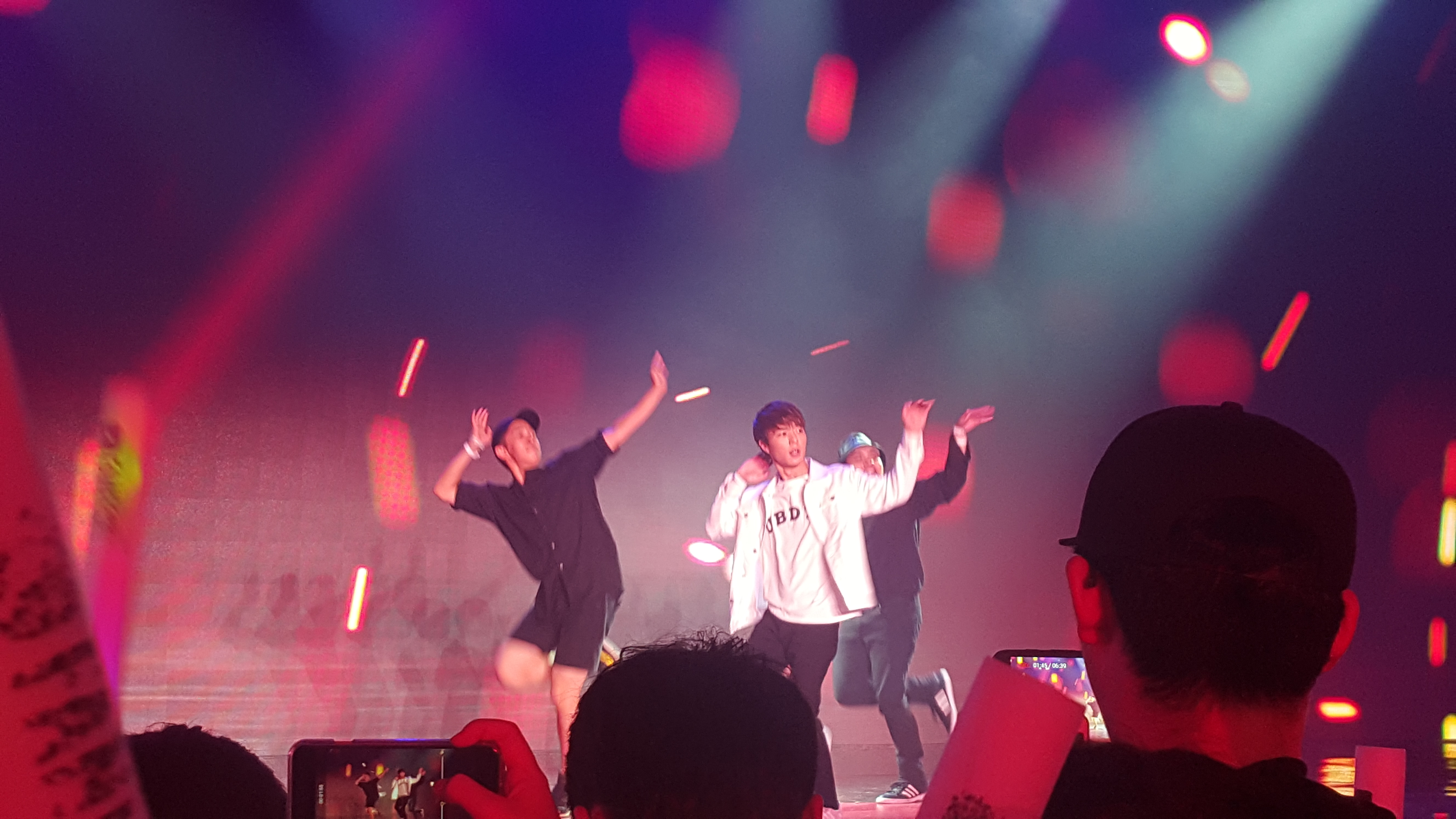 2016년 9월 2일 동대문디자인플라자(DDP) 알림1,2관에서 열린 YouTube FanFest Korea 2016에서 방탄소년단의 "불타오르네" 노래에 맞춰 춤을 추고 있는 준커리안